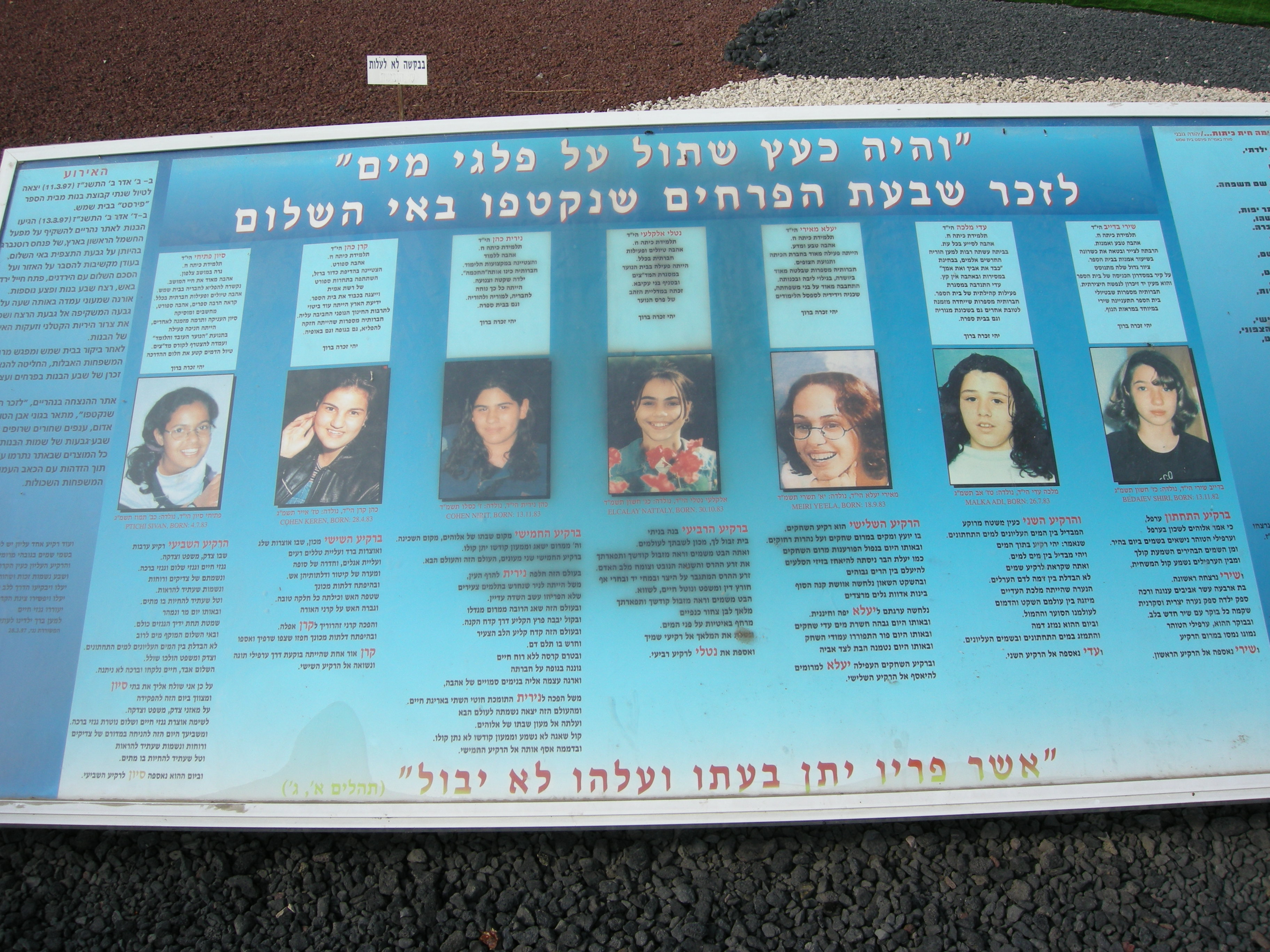 Naharayim memorial